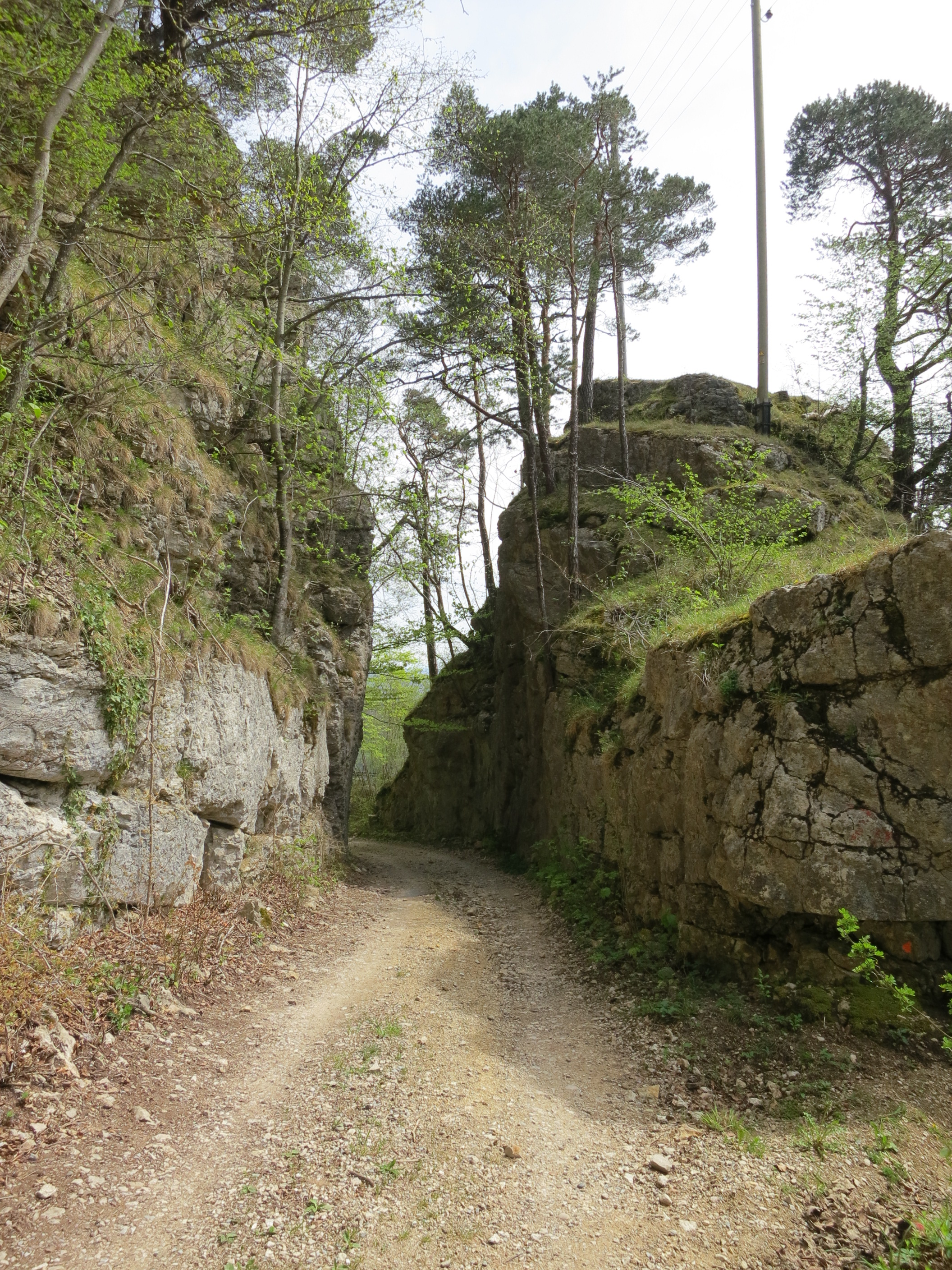 Chäppeliflue, Unterer Hauenstein, Schweiz